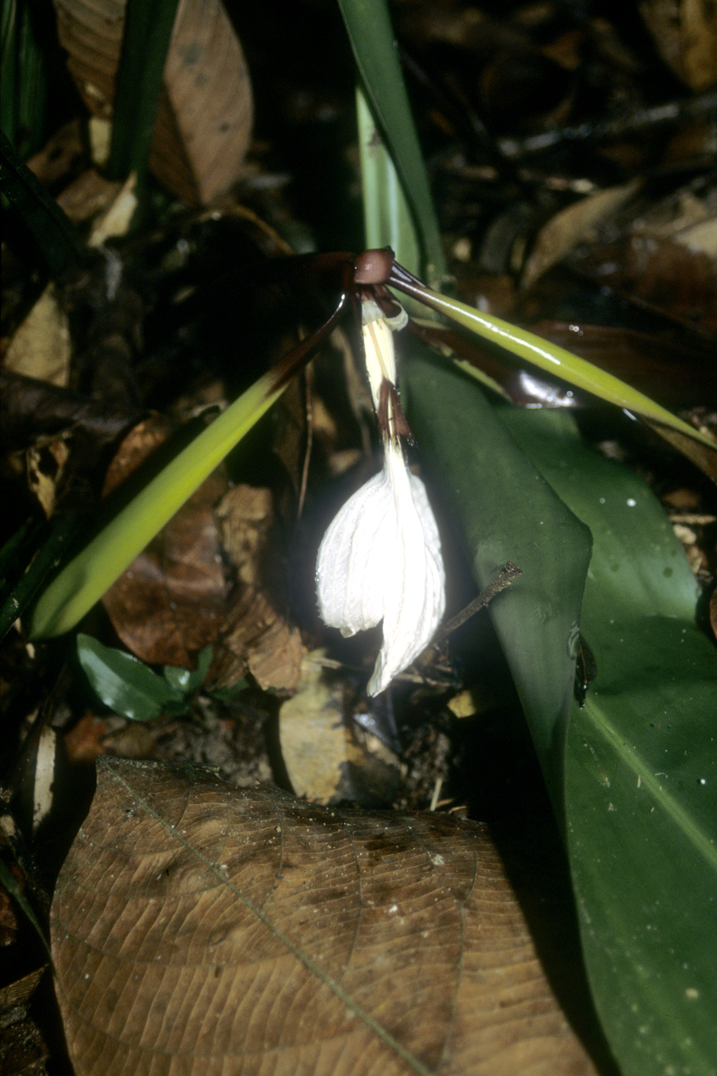 Sungai Nipah, Terengganu, Malaysia. Oct. 2002.